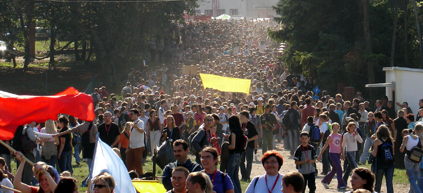 Pielgrzymi wchodzą do Rostkowa